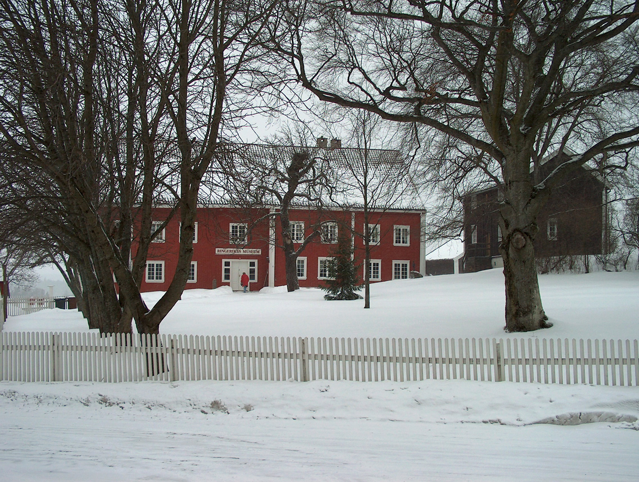 Ringerikes Museum (tidligere prestegård i Norderhov prestegjeld) Photo: T. Bjørnstad, 2006